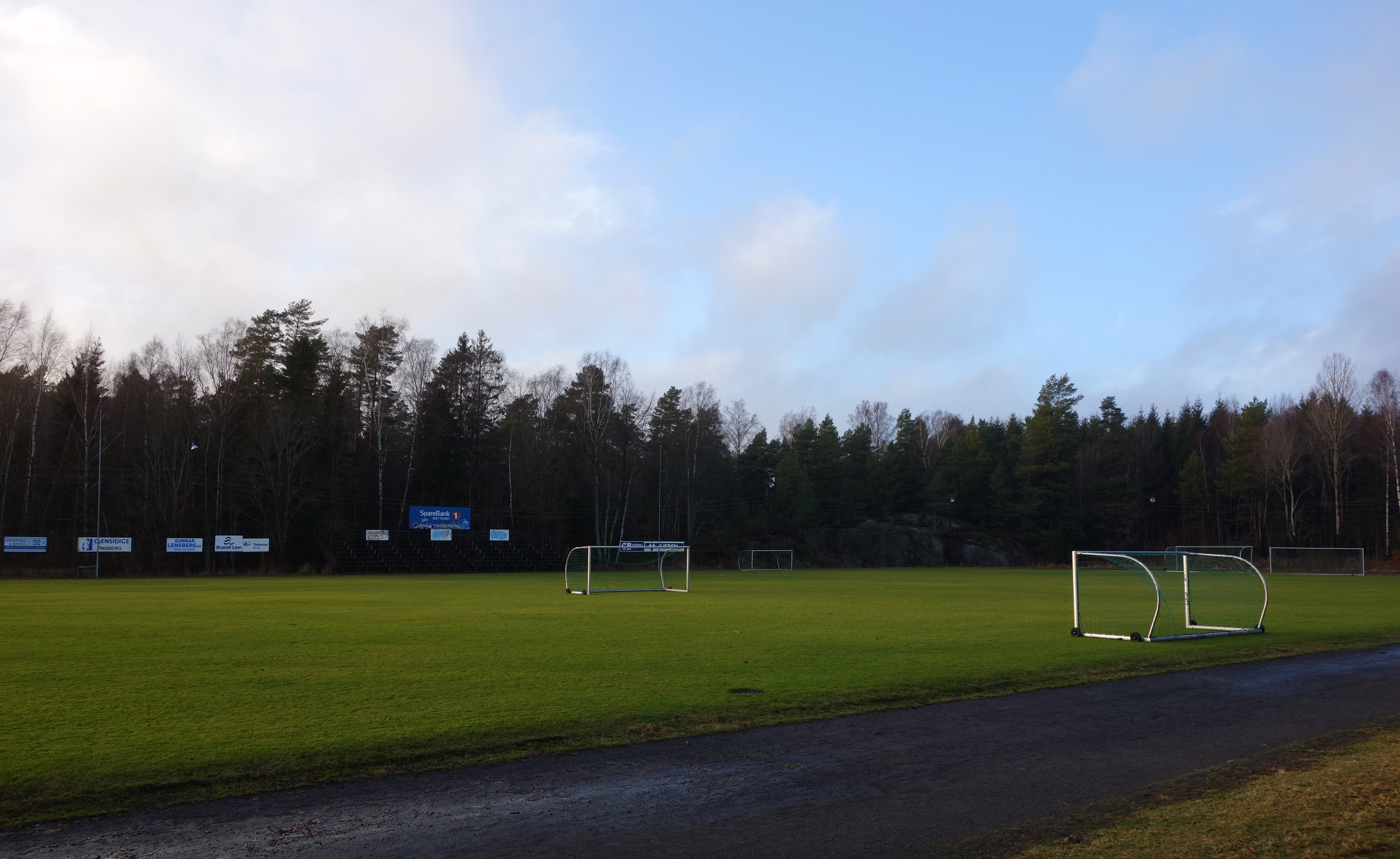 Hovedbanen i Teie idrettspark på Nøtterøy i Vestfold